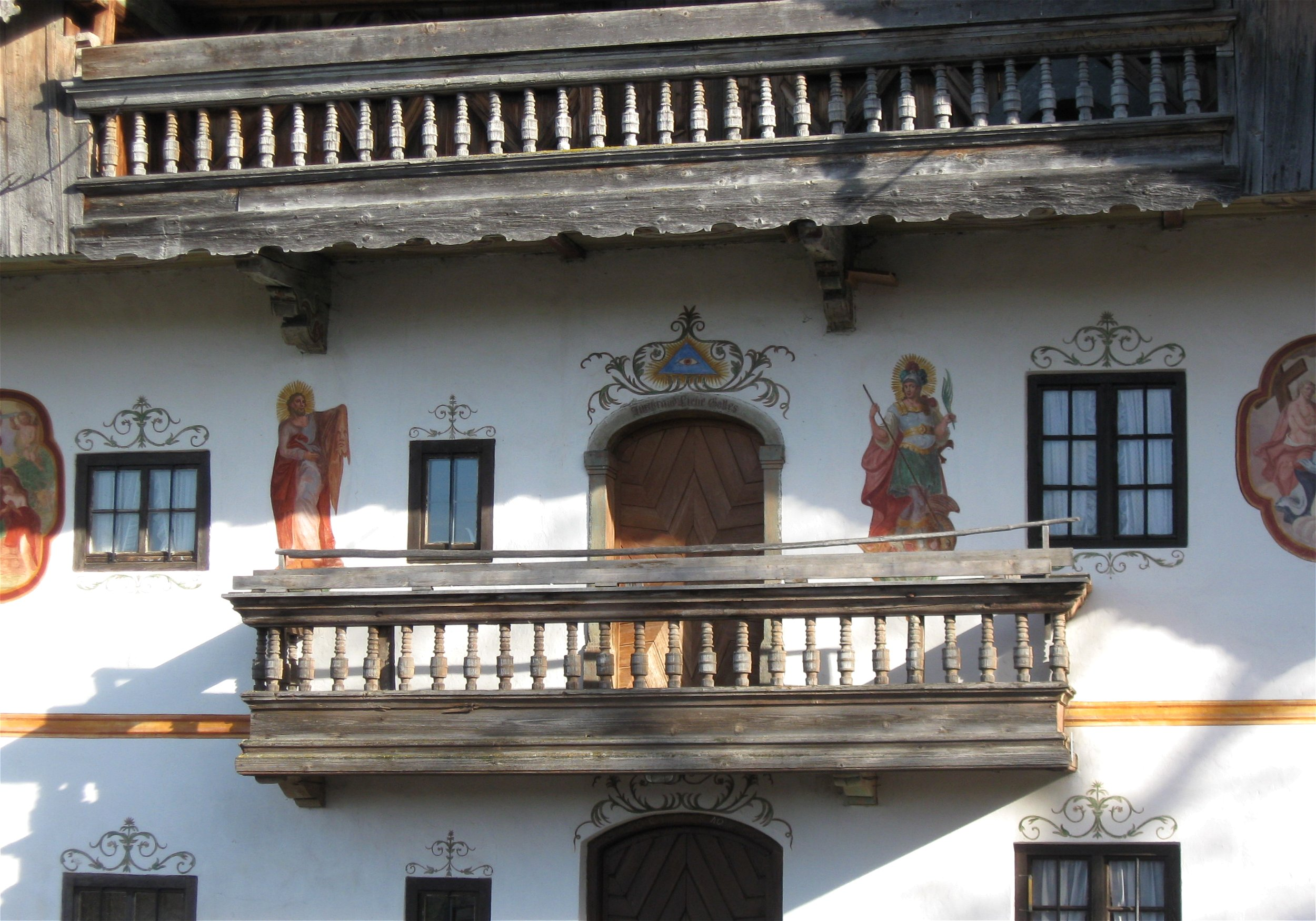 Gritschen (Samerberg), Haus Nr. 1; Bauernhof, einzigartige Anlage; Wohnstallhaus mit Giebellaube, Laube, reicher Fassadenmalerei und Bundwerk an der Traufseite, erbaut 1762